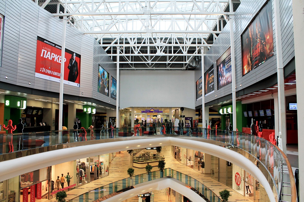 Фойе кінтеатру